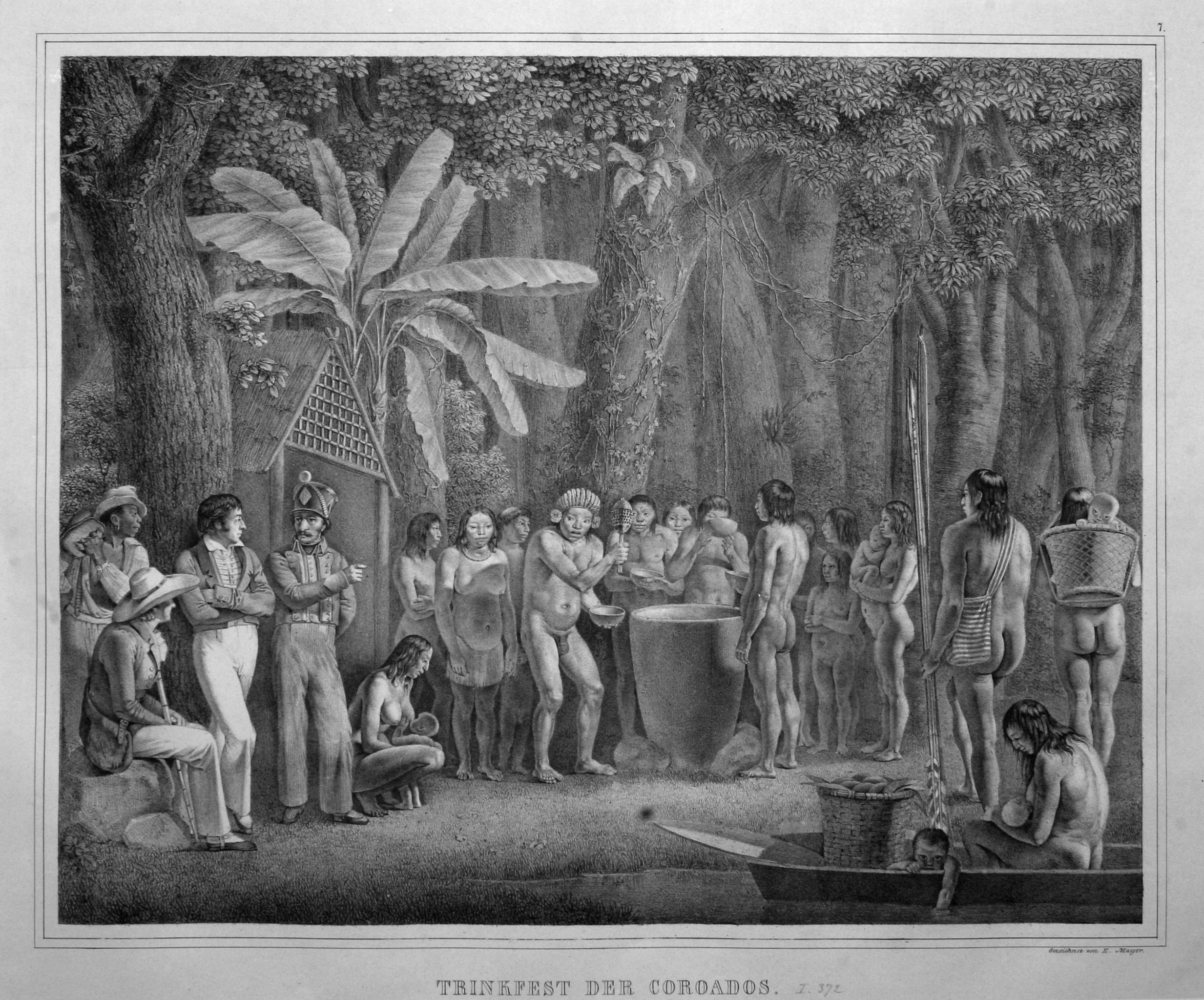 Orignial-Dateien der Digitalisierung von Spix' Reiseatlas (1823-1831 Reise in Brasilien auf Befehl Sr. Majestät Maximilian Joseph I. König von Baiern in den Jahren 1817-1820 gemacht und beschrieben - Atlas)